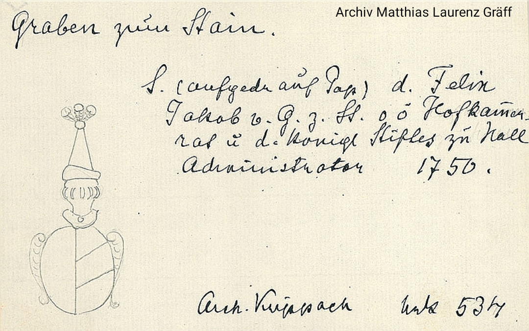 Wappen Felix Jakob von Graben zum Stein aus 1750. Archiv Mag. Matthias Laurenz Gräff